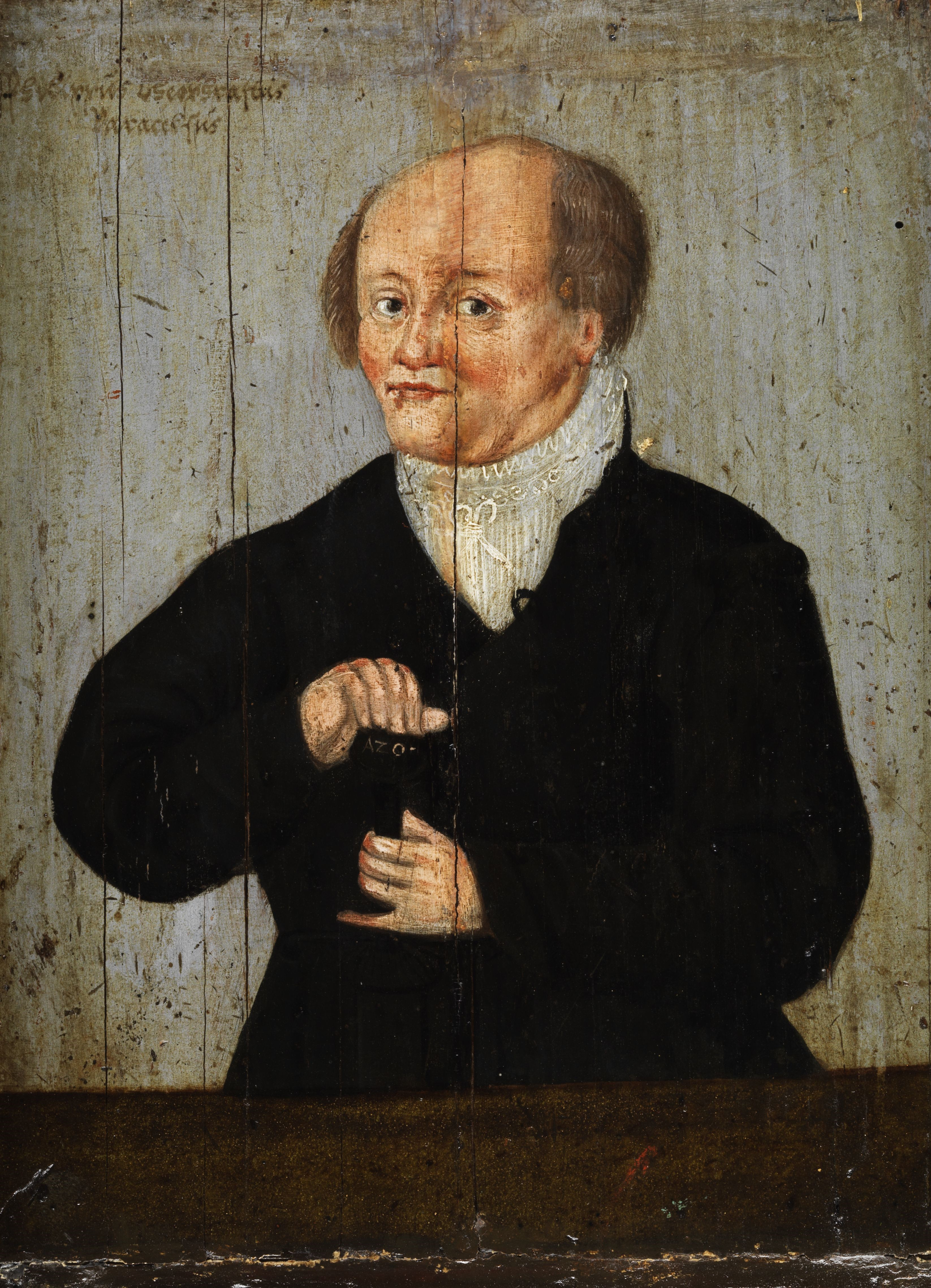 Philippus Theophrastus Paracelsus. Öl auf Holz. 21 x 15,5 cm. Vermutlich nach einem Stich von Augustin Hirschvogel (1503-1553) aus dem Jahr 1540